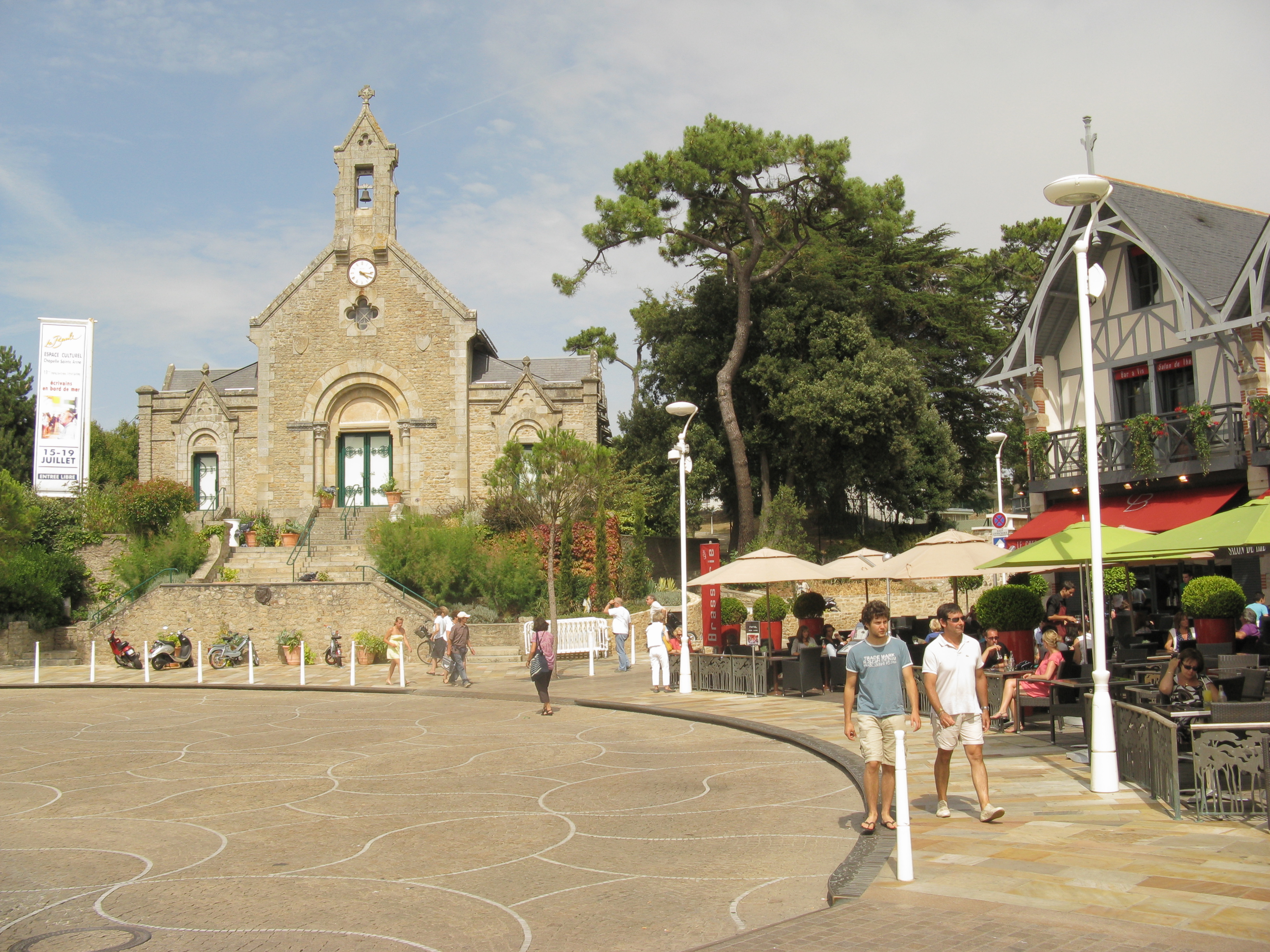 Former chapel of Saint-Anne, now a cultural center, at La Baule, Loire-Atlantique, France.